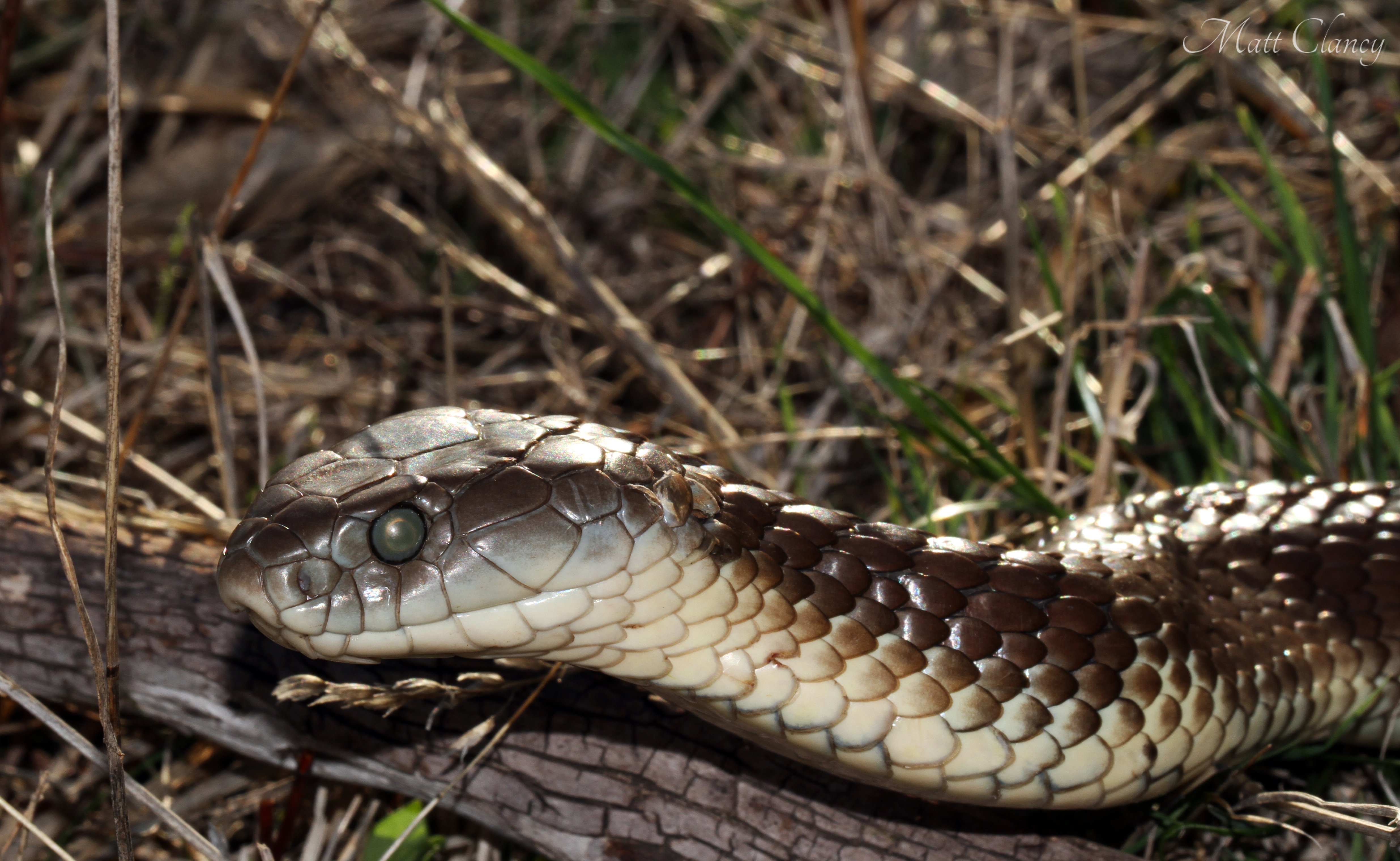 Melbourne, Vic.